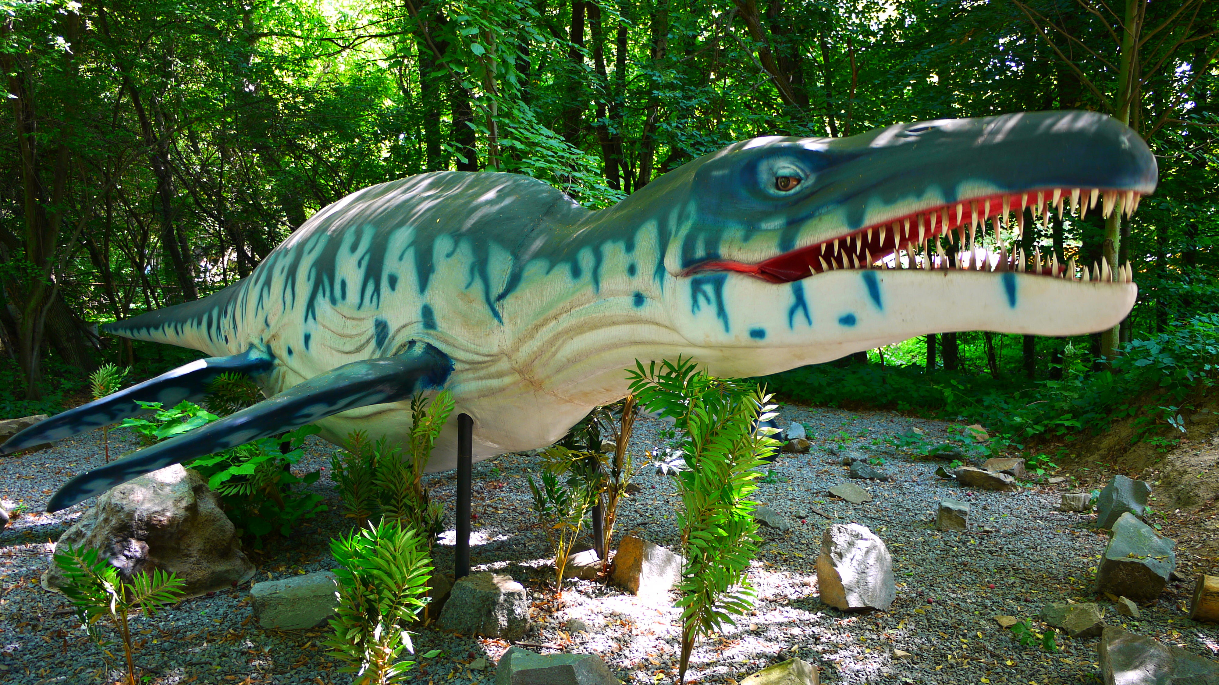 Liopleurodon, DinoPark Vyškov